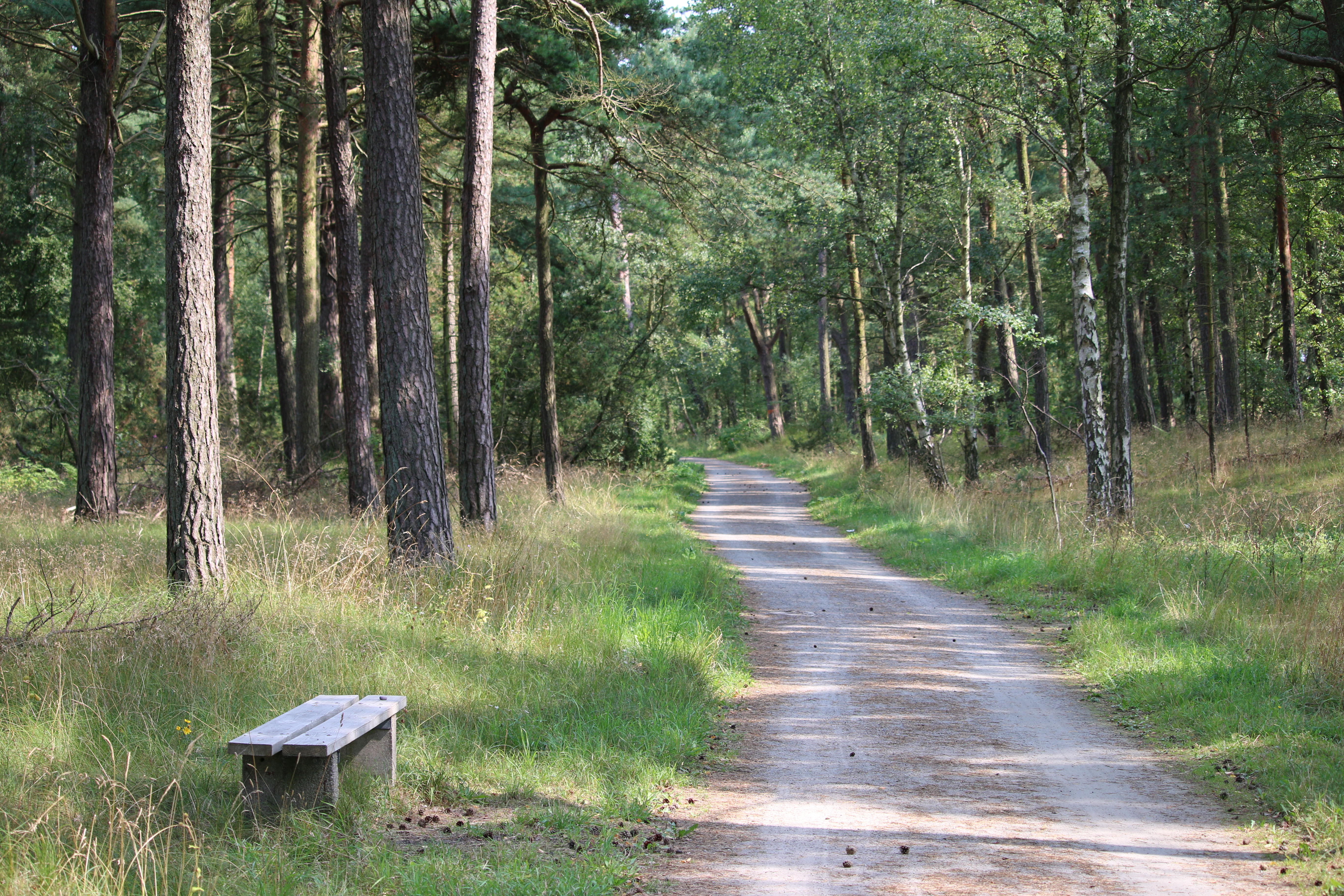 Ystads sandskog